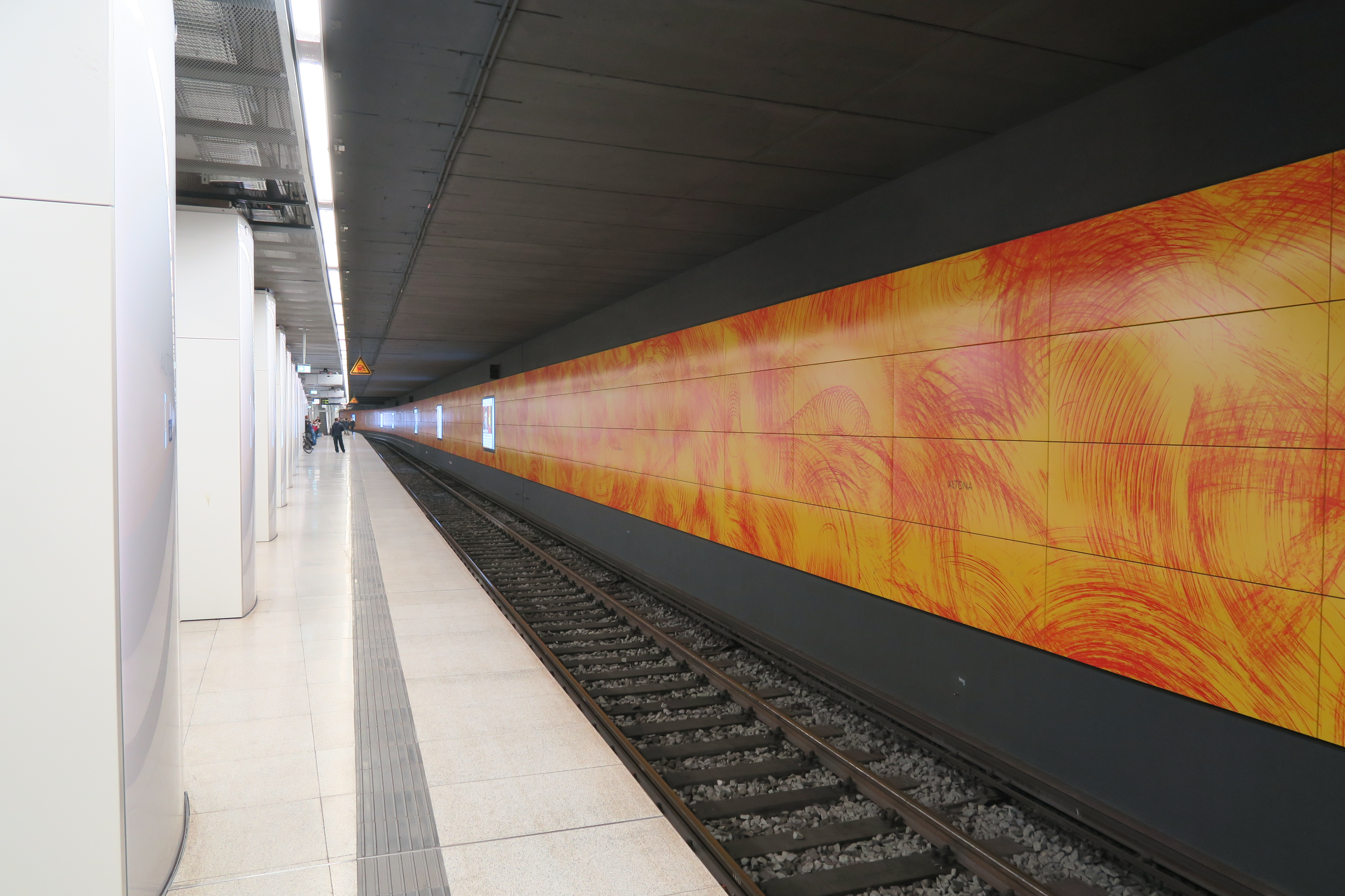 S-Bahnhof Altona in Hamburg nach der Umgestaltung 2018